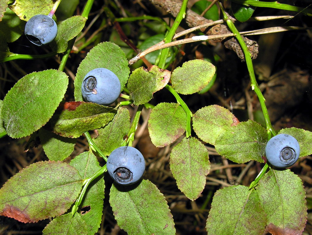 Mėlynė (Vaccinium myrtillus), vaisiai Šeima. Erikiniai (Ericaceae) Foto: Algirdas, 2006 m. liepos 25 d., Lietuva